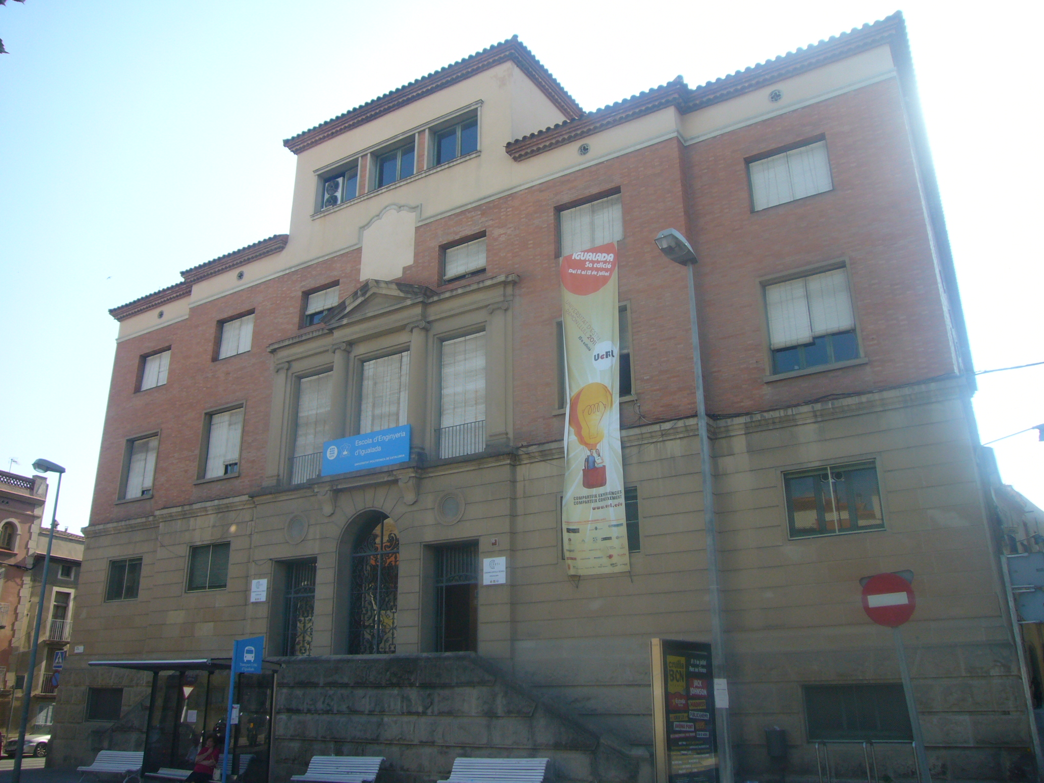 Escola d'Enginyeria d'Igualada (UPC). Seu a la plaça del Rei en una imatge de 2011. Posteriorment, l'any 2014 l'escola es traslladà a una nova ubicació al pla de la Massa.